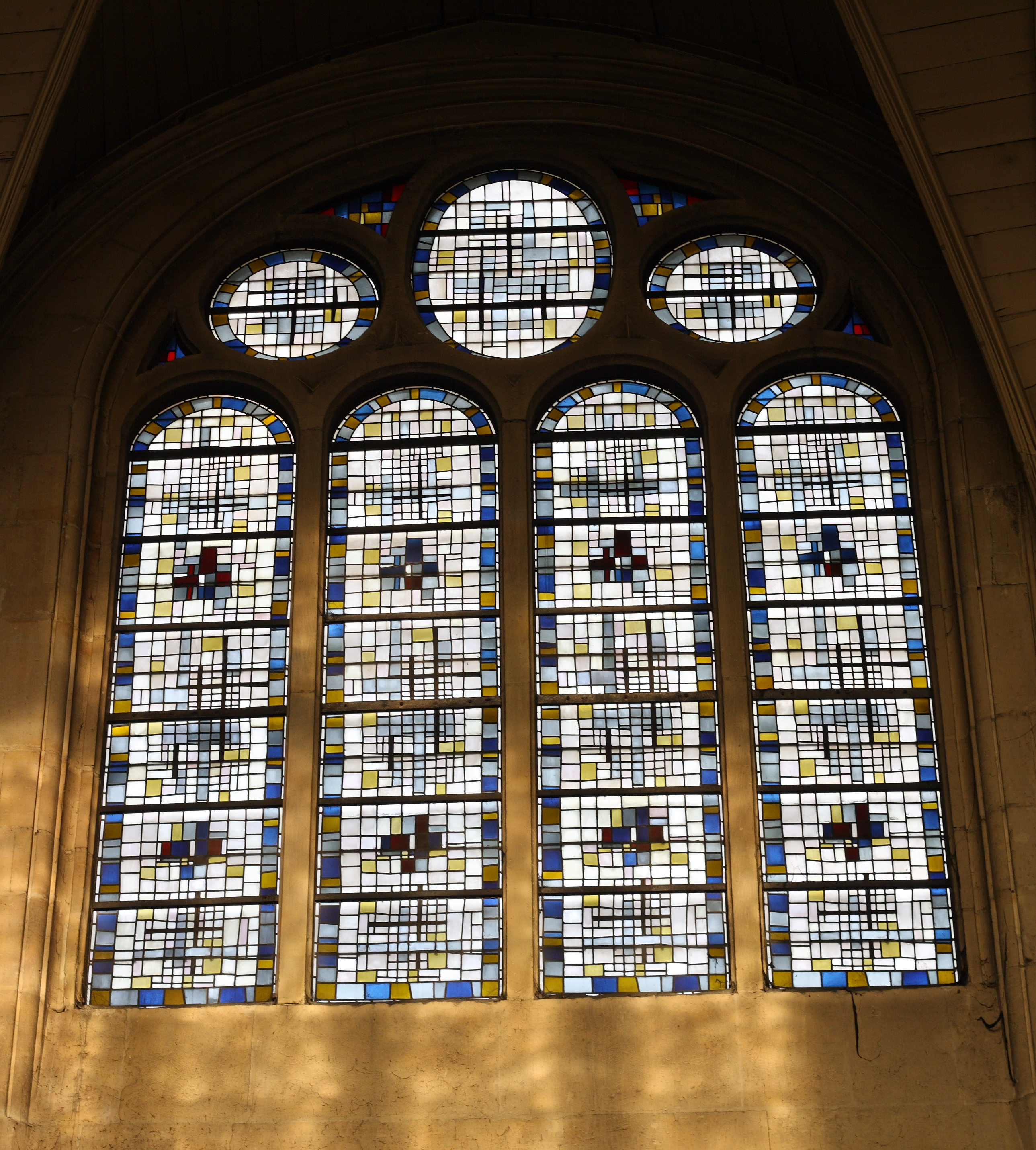 Bleiglasfenster (Chor) in der katholischen Pfarrkirche St-Médard in Paris, Darstelllung: abstrakt